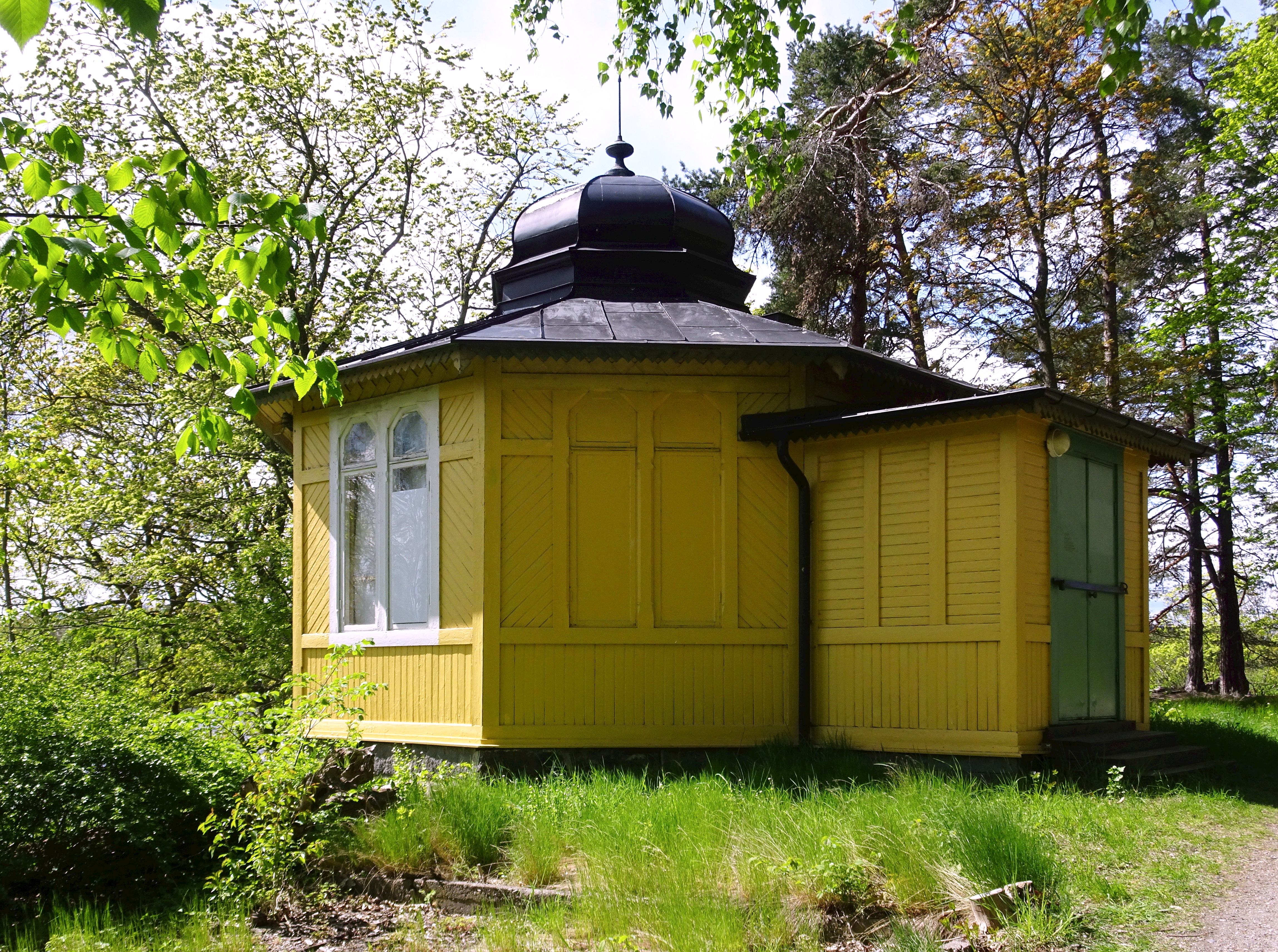 Fabrikören K.G. Lundströms lusthus "Monte Carlo" vid Brunnsviken